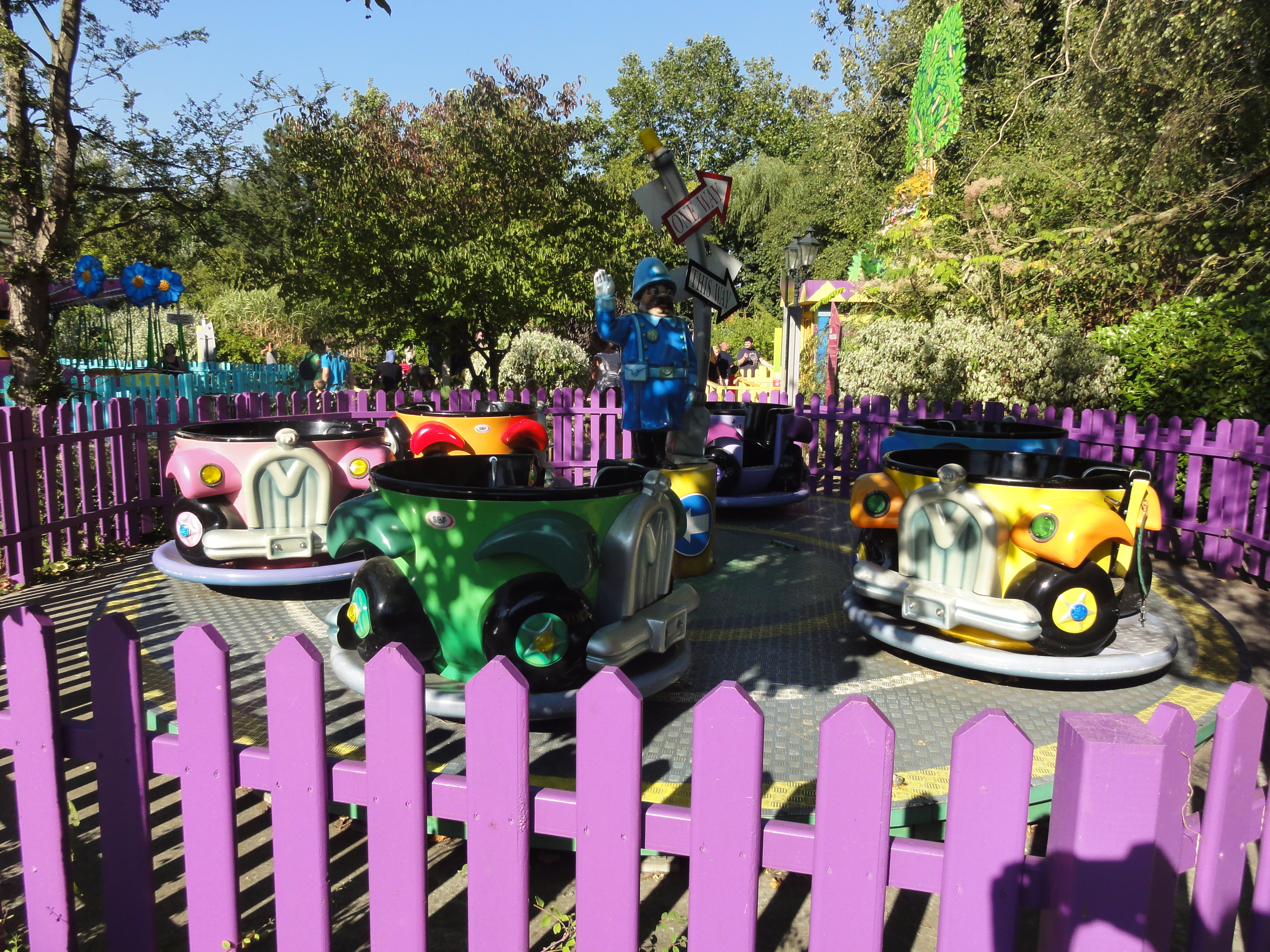 Vue générale de Walibi Belgium.